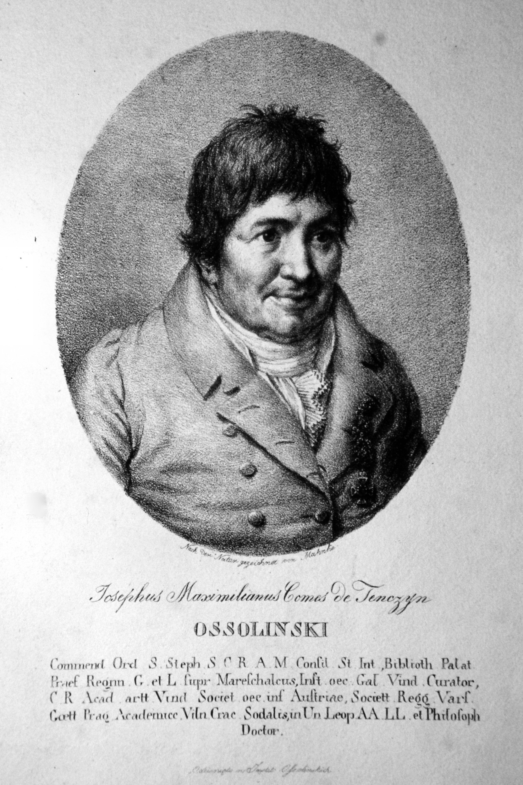 Josef Maximilian Ossolinski (1748-1828), polnisch-österreichischer Sammler, Historiker, Mäzen und Politiker. Lithographie von Mahnke, um 1828